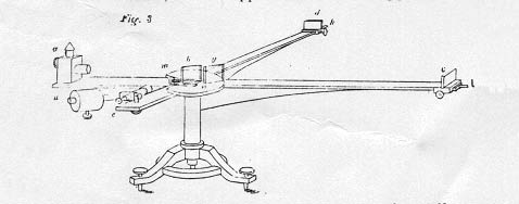 Общий вид интерферометра в перспективе. Изображение из доклада А.Майкельсона по результатам его экспериментов, выполненных в 1881 г. 1. Albert A. Michelson, Edward W. Morley. On the Relative Motion of the Earth and the Luminiferous Ether. The American Journal of Science. III series. Vol. XXII, No. 128, P.120 – 129 (имеется перевод данной статьи в книге "Эфирный ветер" под редакцией доктора технических наук В.А. Ацюковского. М. Энергоатомиздат, 1992).